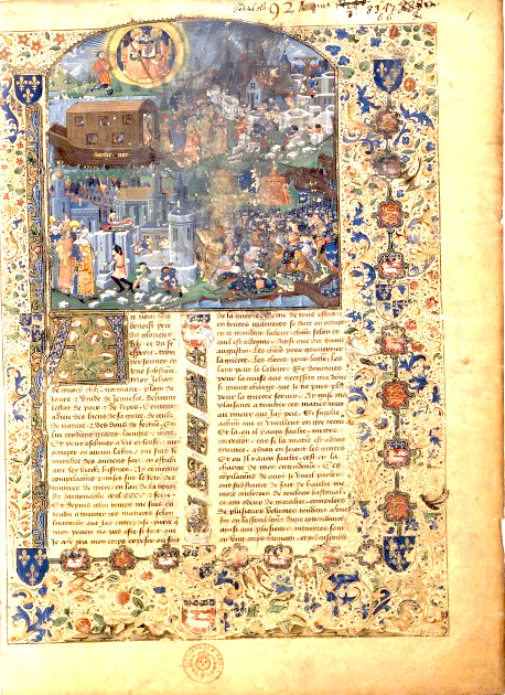 Bouquechardière BnF 2685 Fol. 1 - Jean de Courcy priant